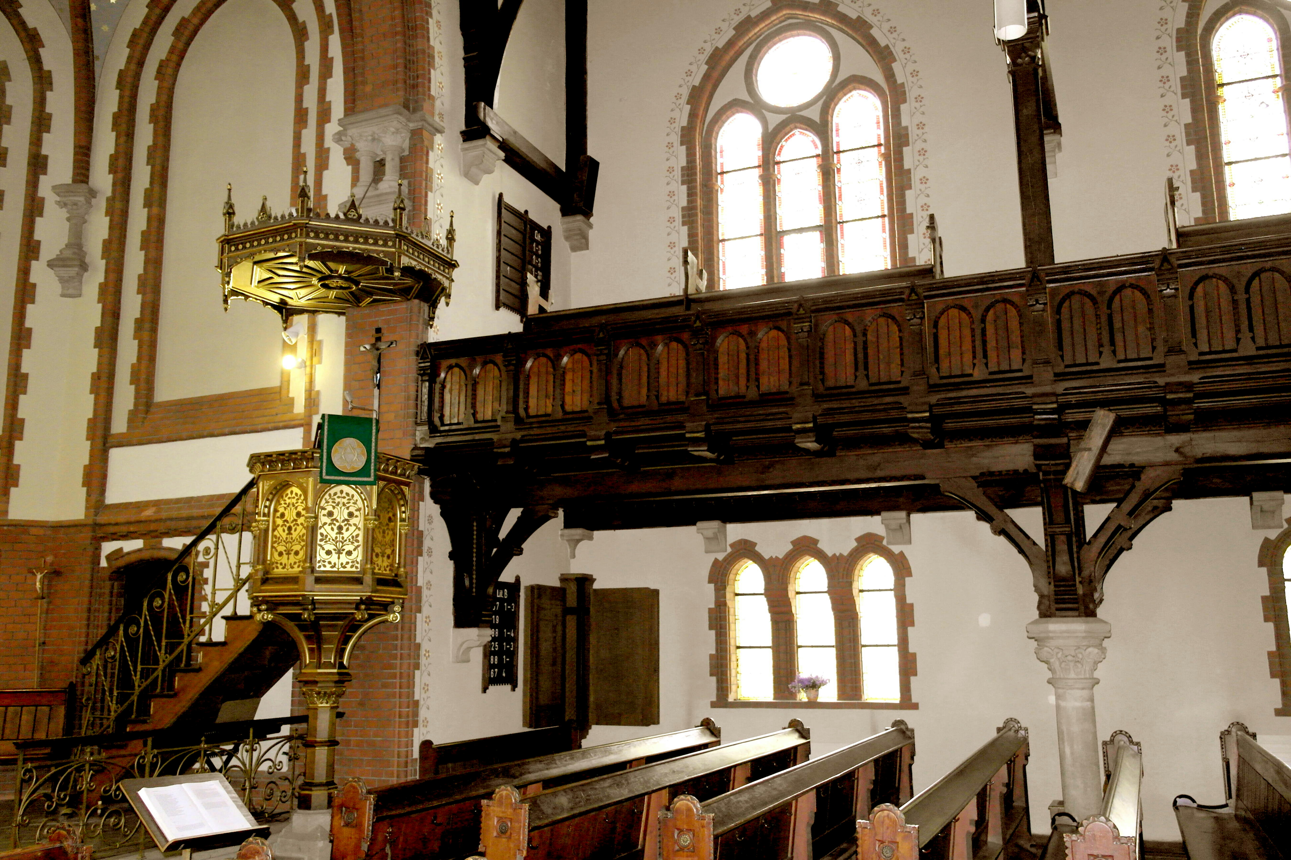 St.Trinitatiskirche in Bad Elster, Innenansicht